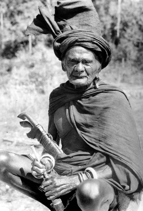 Repronegatief. De Ratu Merapu prepareert zijn sirihpijp